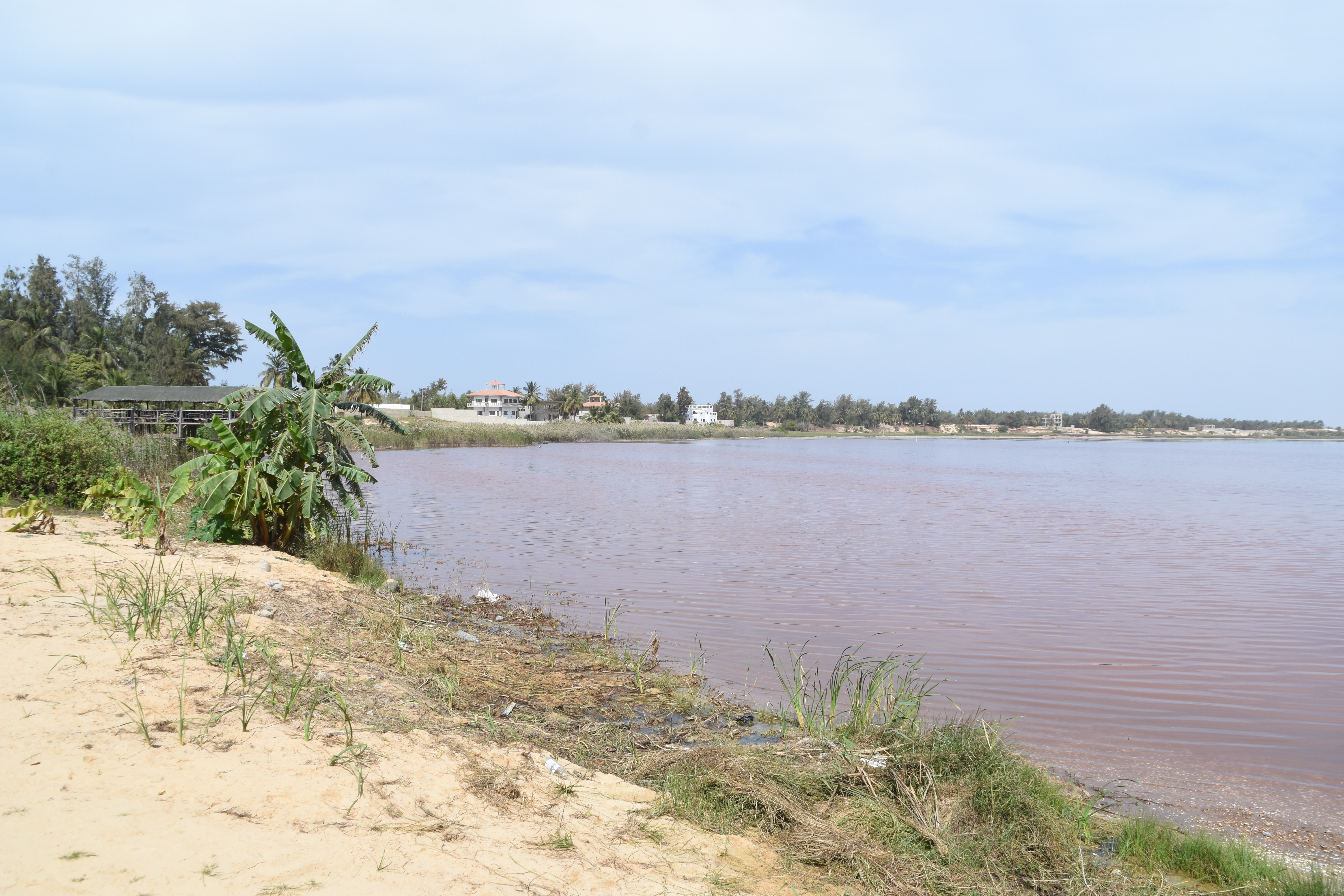 Retba See vom Strand aus gesehen